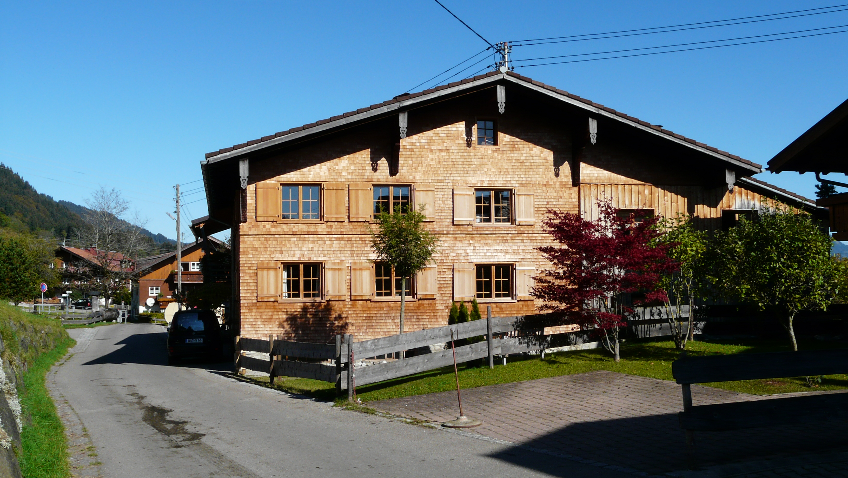 Sonderdorf 23, Bolsterlang